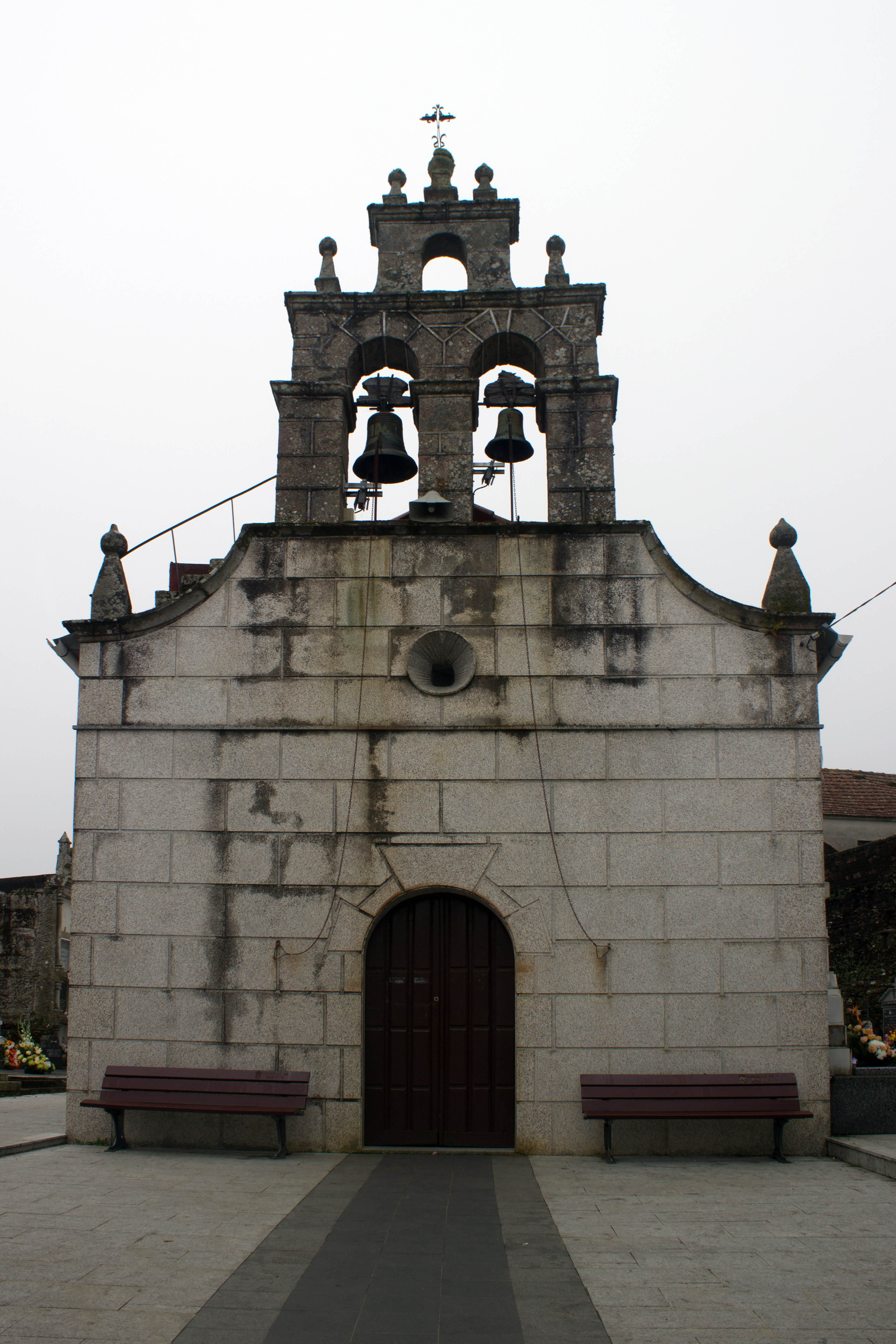 Capela de Santo Antón de Feás, no concello de Boborás.